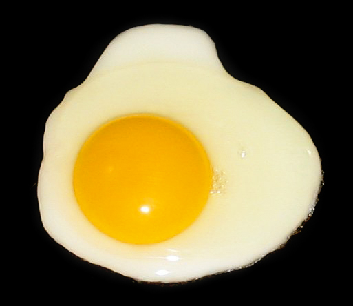 A fried egg, sunny side up.